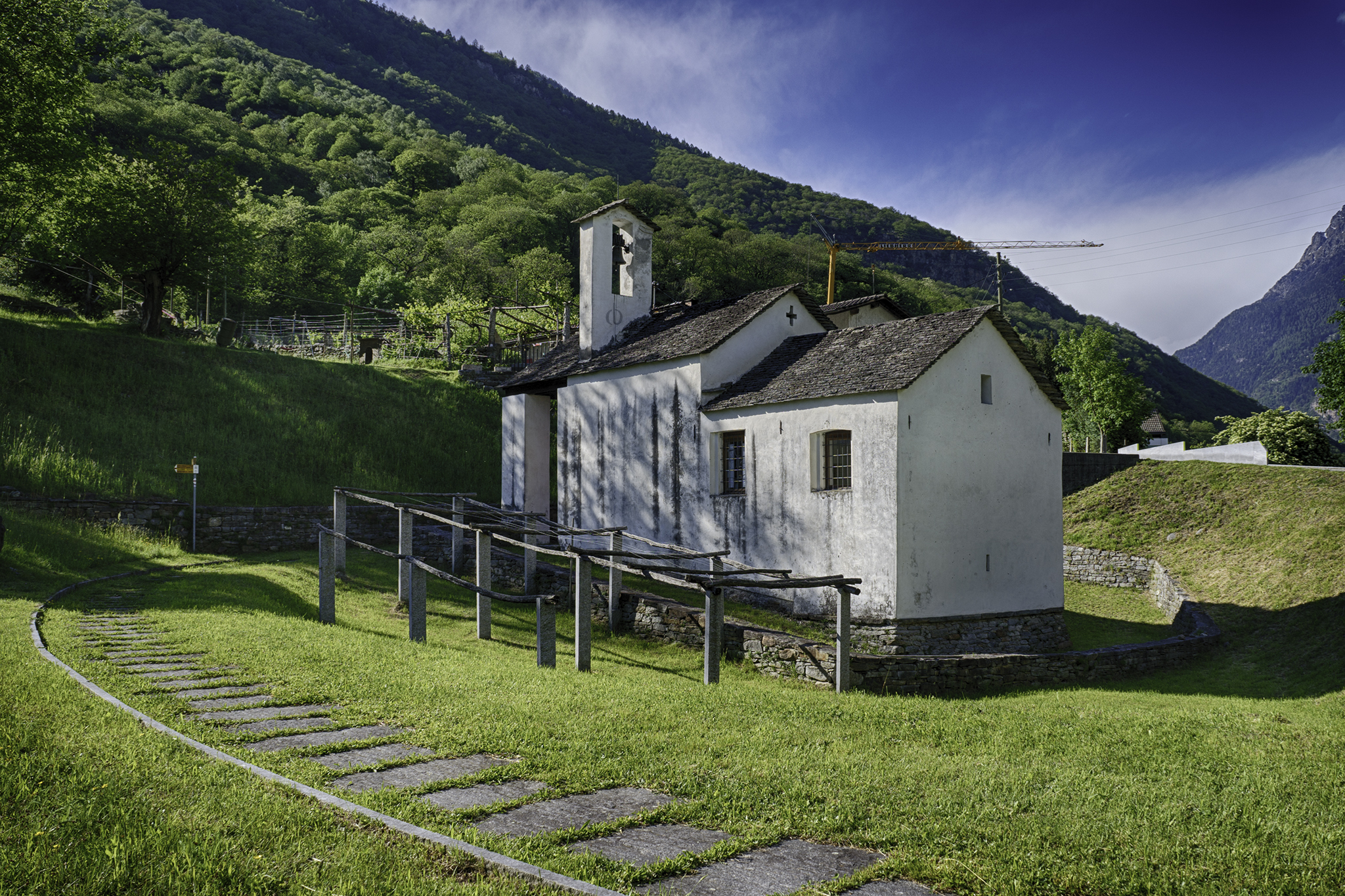 Oratorio della Natività di Maria (Loderio) vista laterale/posteriore